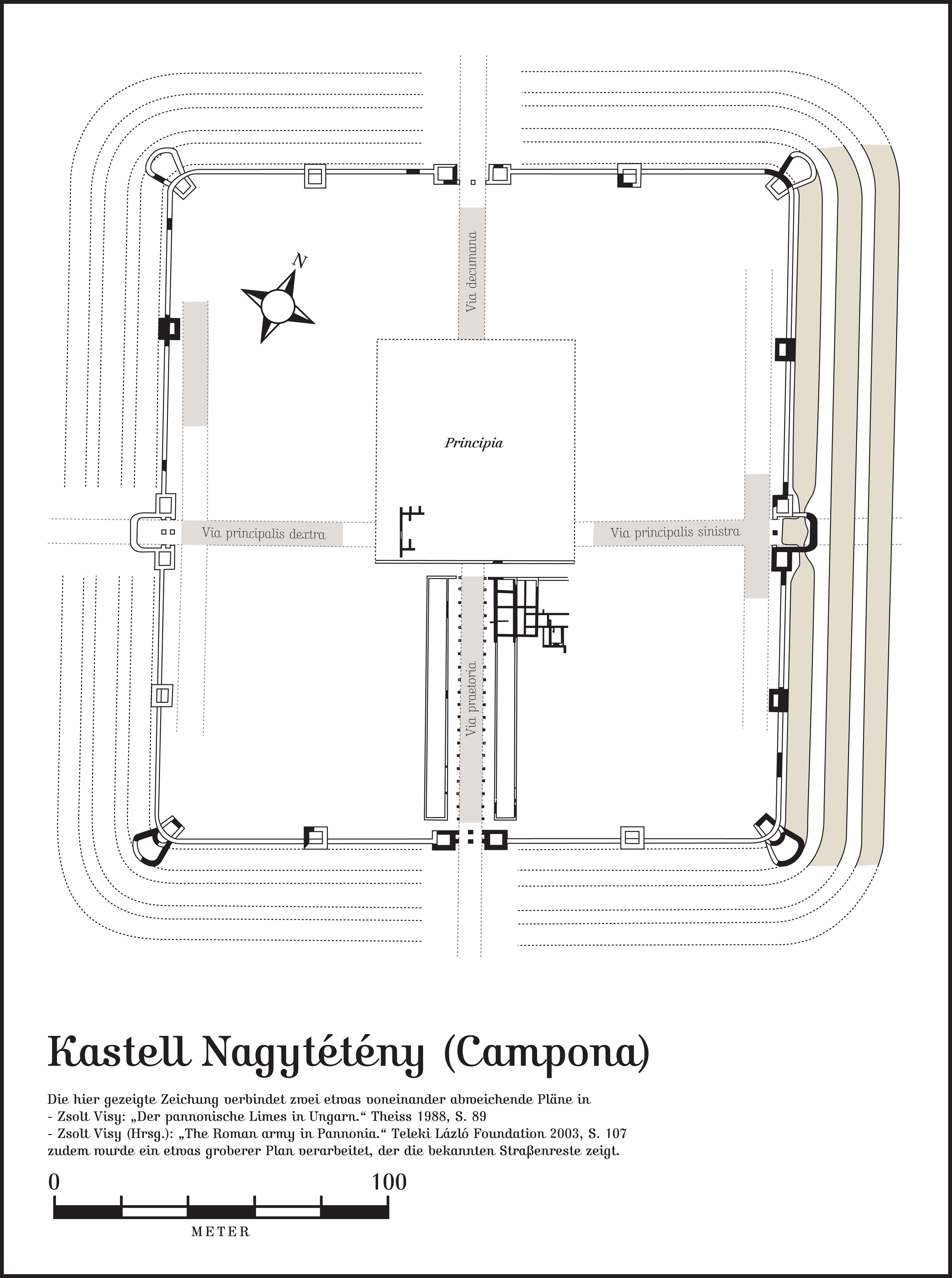 Planzeichnung der Befunde am pannonischen Donaukastell Nagytétény (Campona) bis zu den Grabungen in den 1990er Jahren.